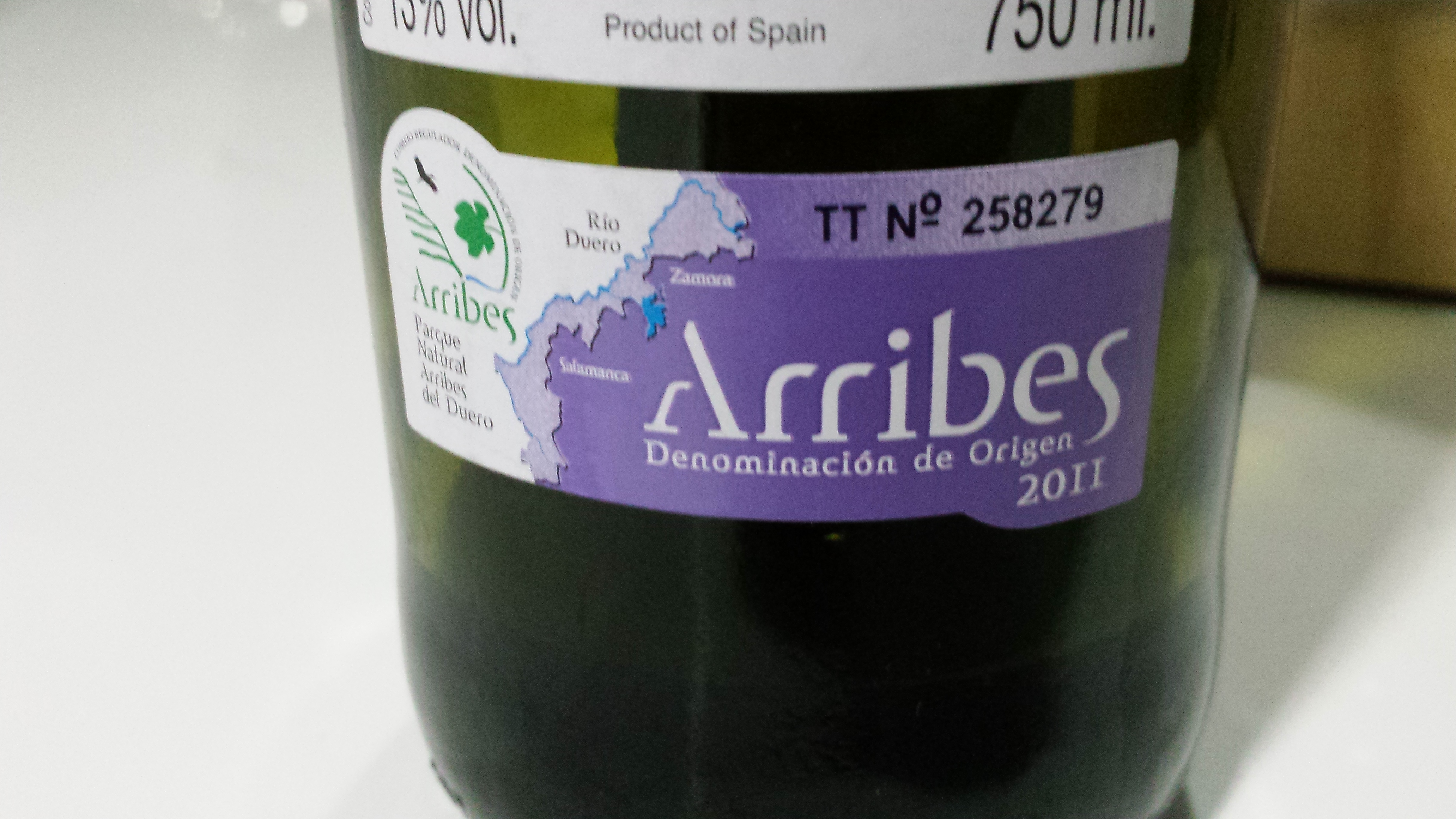 Etiqueta vino de la denominación de origen Arribes, Castilla y León , España